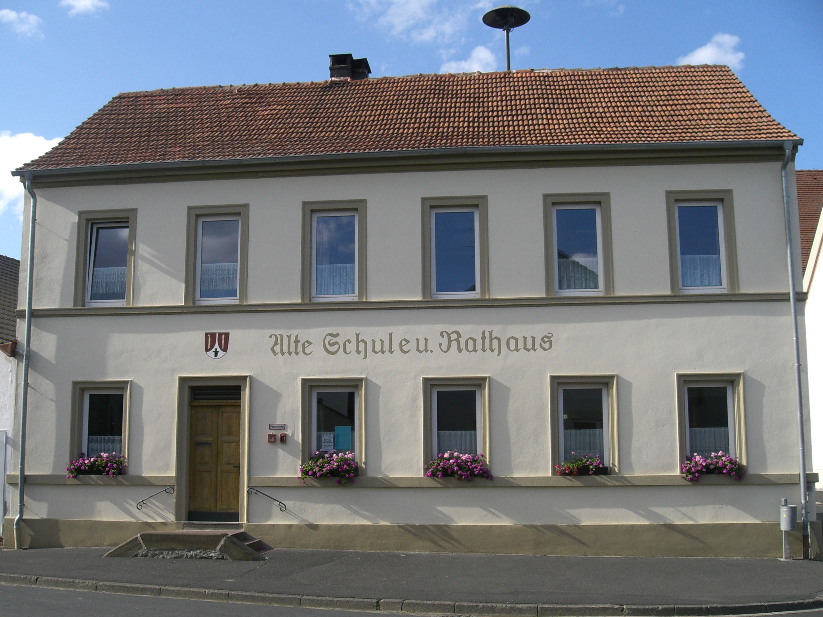 altes Rathaus und Schule in Wasserlosen